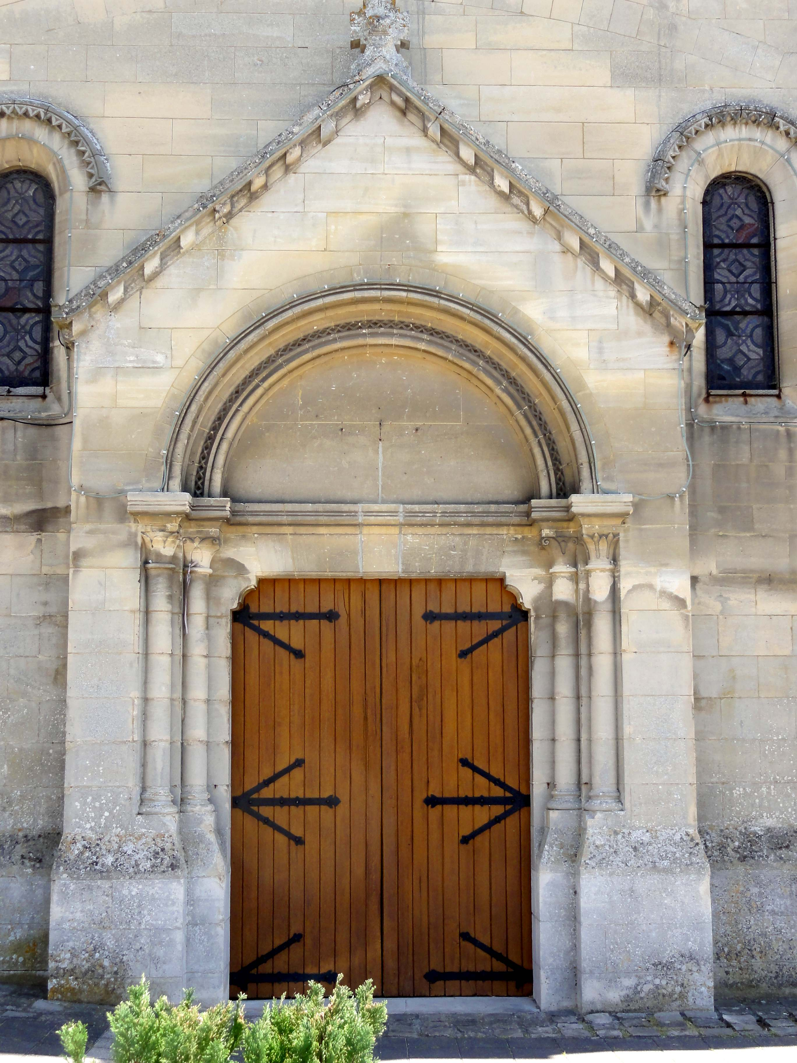 Église de la Sainte-Trinité de Choisy-au-Bac (voir titre).